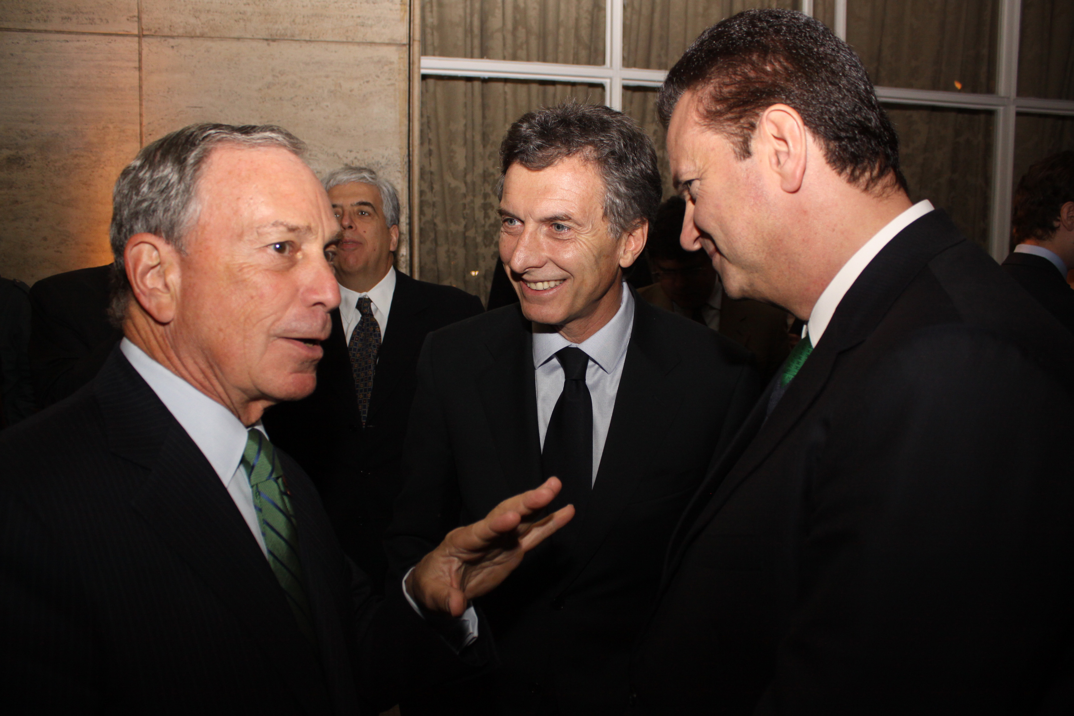 San Pablo - El jefe de Gobierno porteño, Mauricio Macri, compartió con los alcaldes de Nueva York, Michael Bloomberg, y de San Pablo, Gilberto Kassab, la cumbre del C40 contra el cambio climático que integran medio centenar de mega ciudades de todo el mundo.